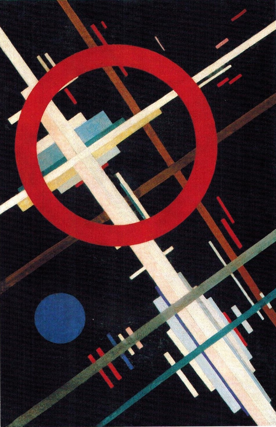 Илья Чашник. Композиция. 1926-1927. Холст, масло.